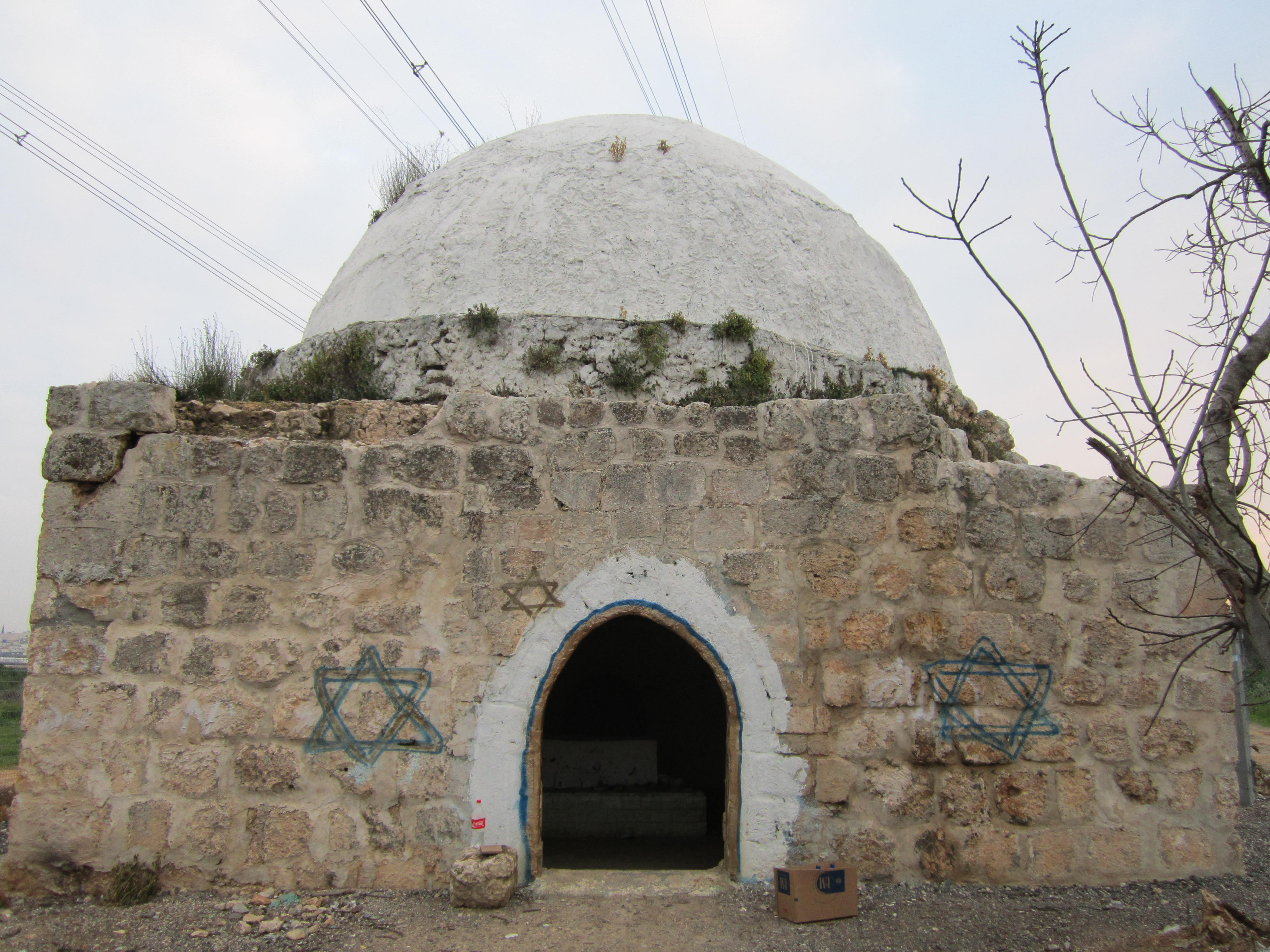 קבר שמעון בן יעקב